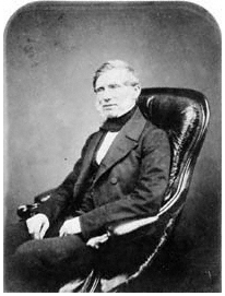 Der britische Botaniker John Miers im Jahre 1855